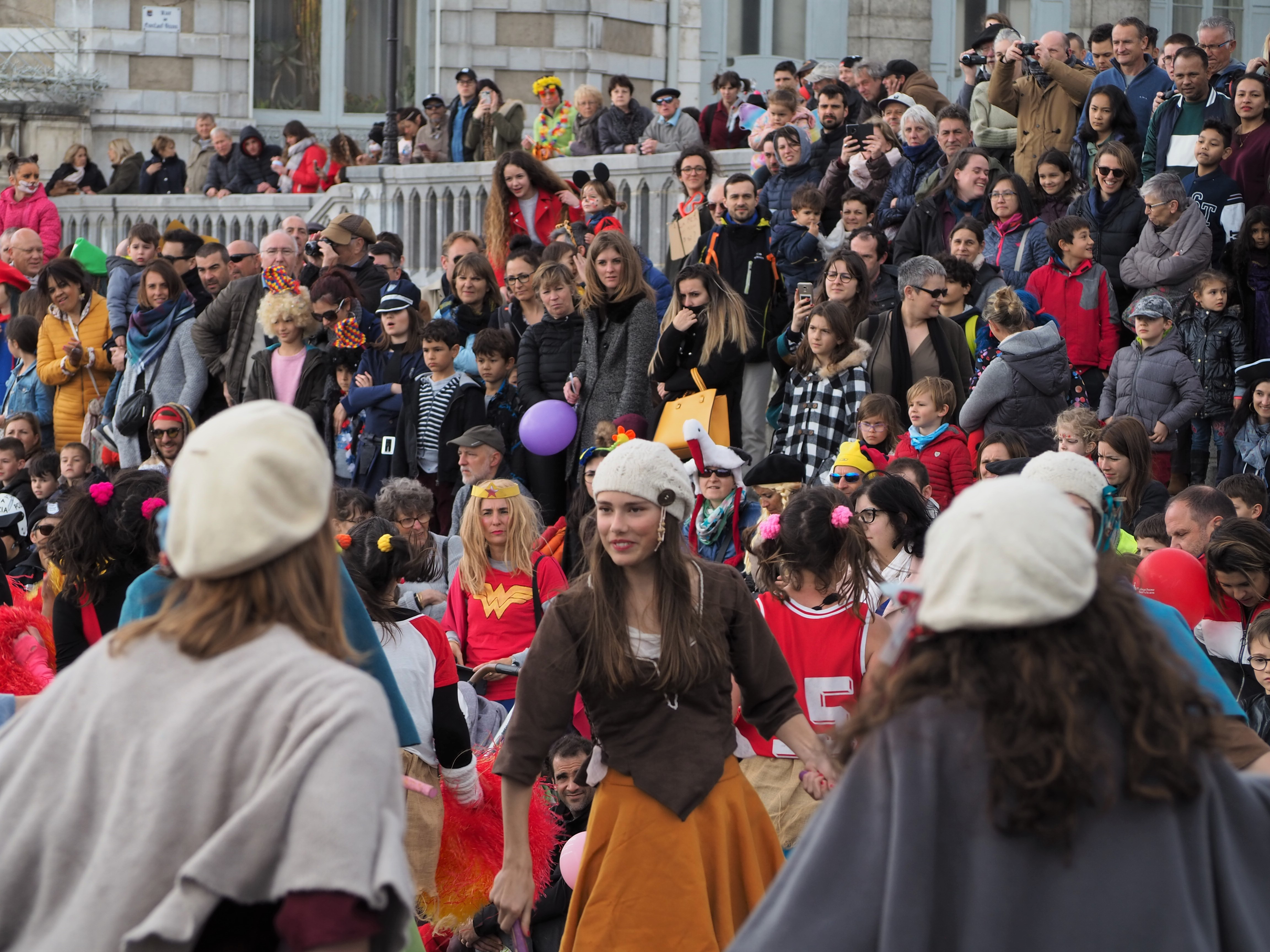 Le carnaval biarnès, Pau 2019